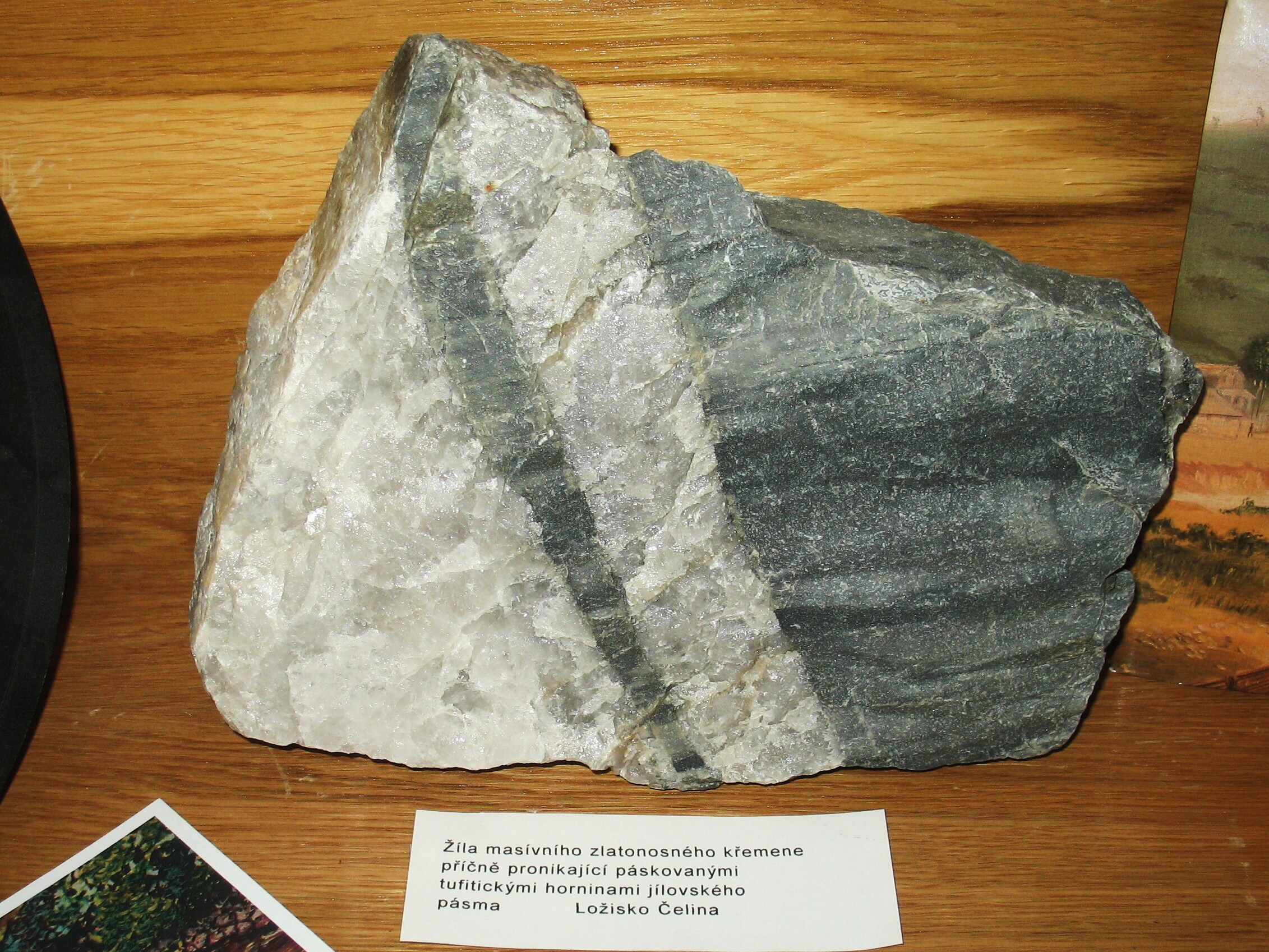 Vzorek zlatonosného křemene z ložiska Čelina v Muzeu zlata v Novém Kníně